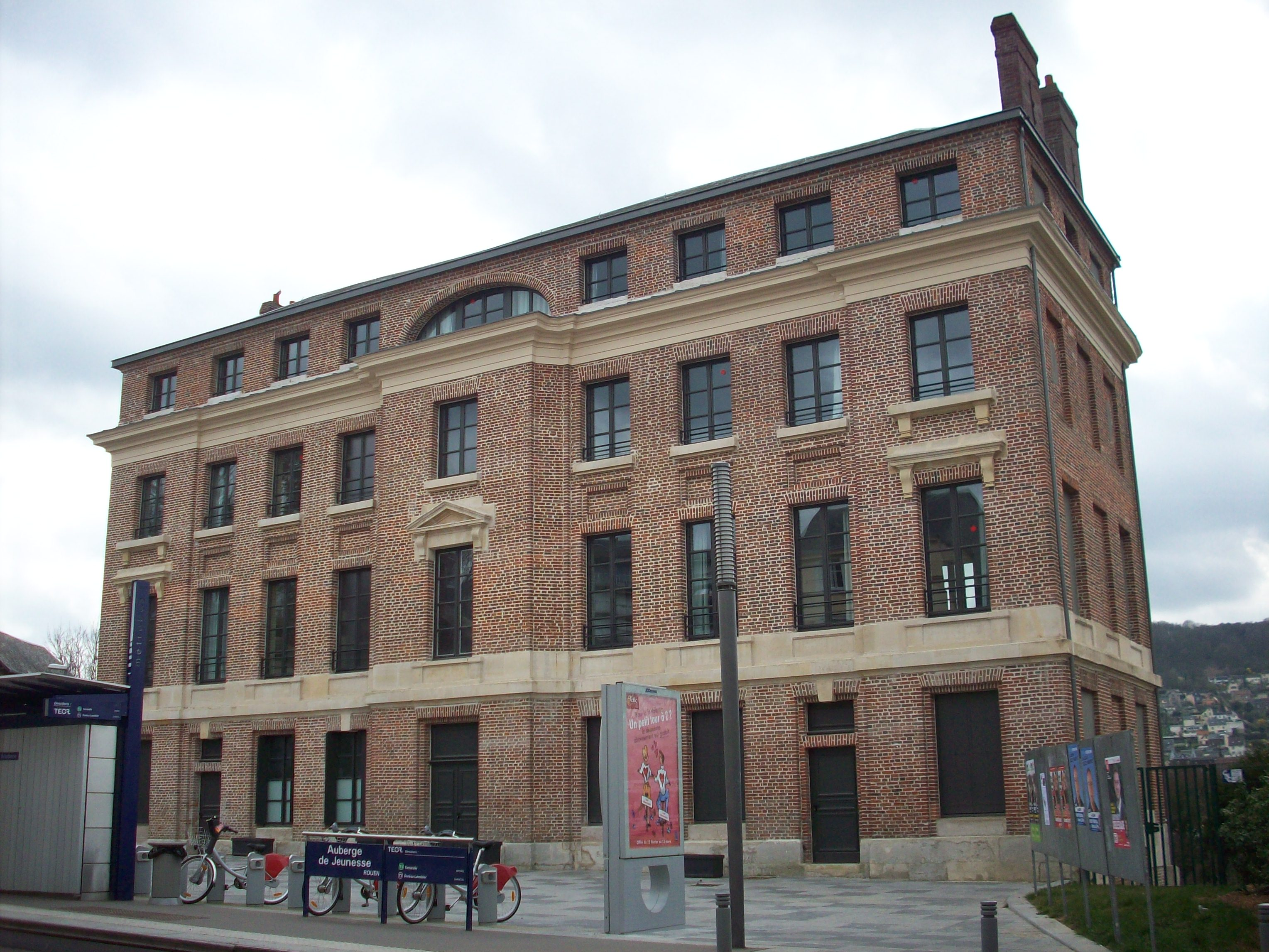 Teinturerie Auvray, actuelle auberge de jeunesse de Rouen (Seine-Maritime, France).